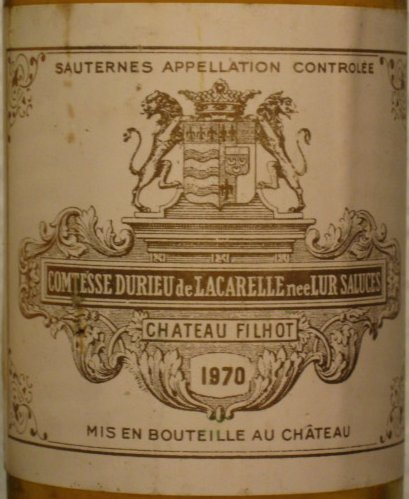 Château Filhot 1970 label